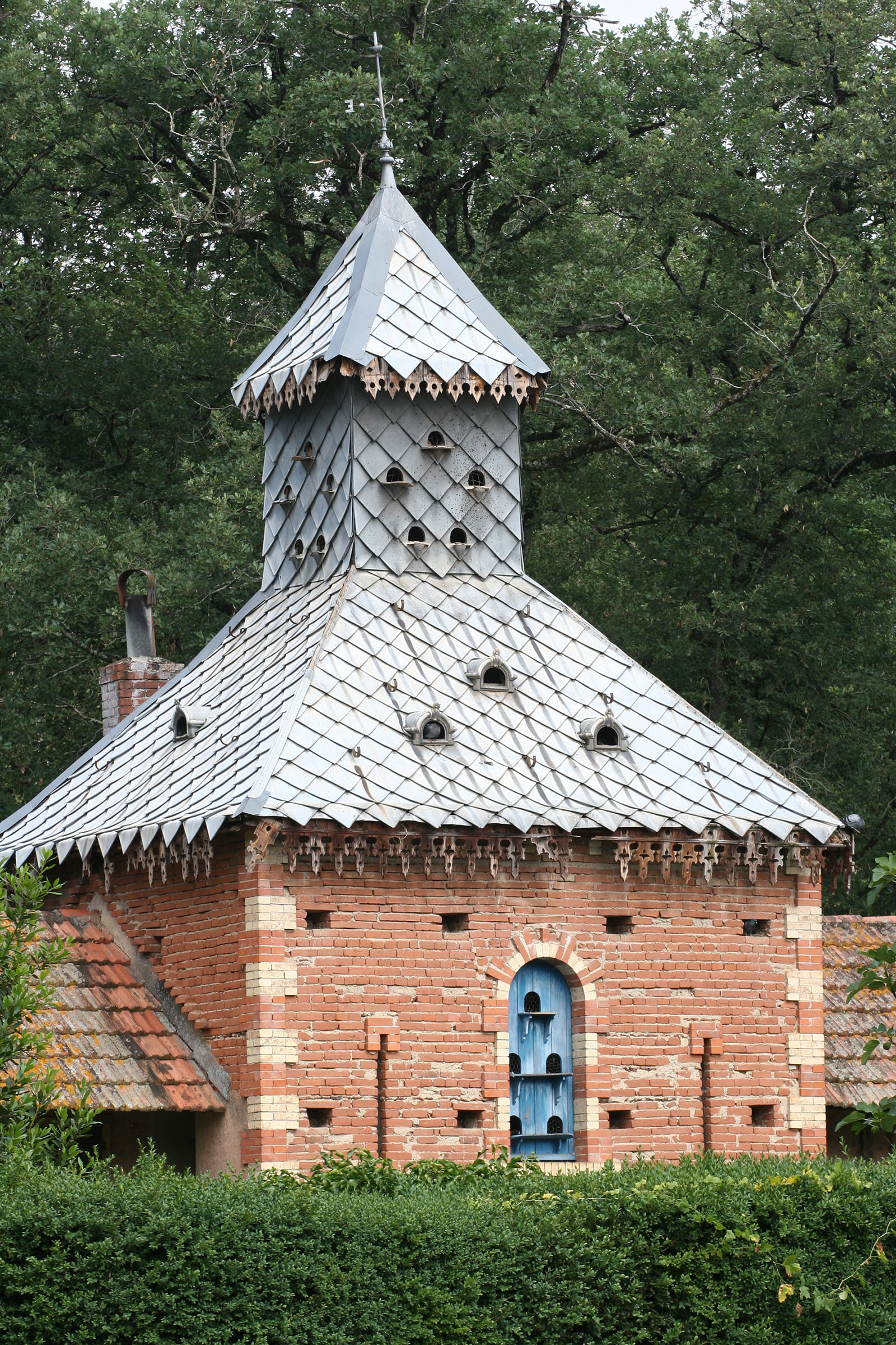 Pigeonnier du Buc